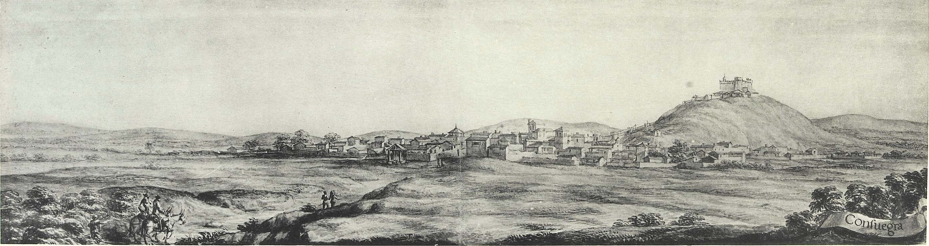 Consuegra, acuarela de Pier Maria Baldi, Biblioteca Laurenciana de Florencia, recogida en Sánchez Rivero A, Mariutti de Sánchez Rivero A. "Viaje de Cosme de Médicis por España y Portugal (1668-1669)", Madrid: Sucesores de Rivadeneyra; 1933